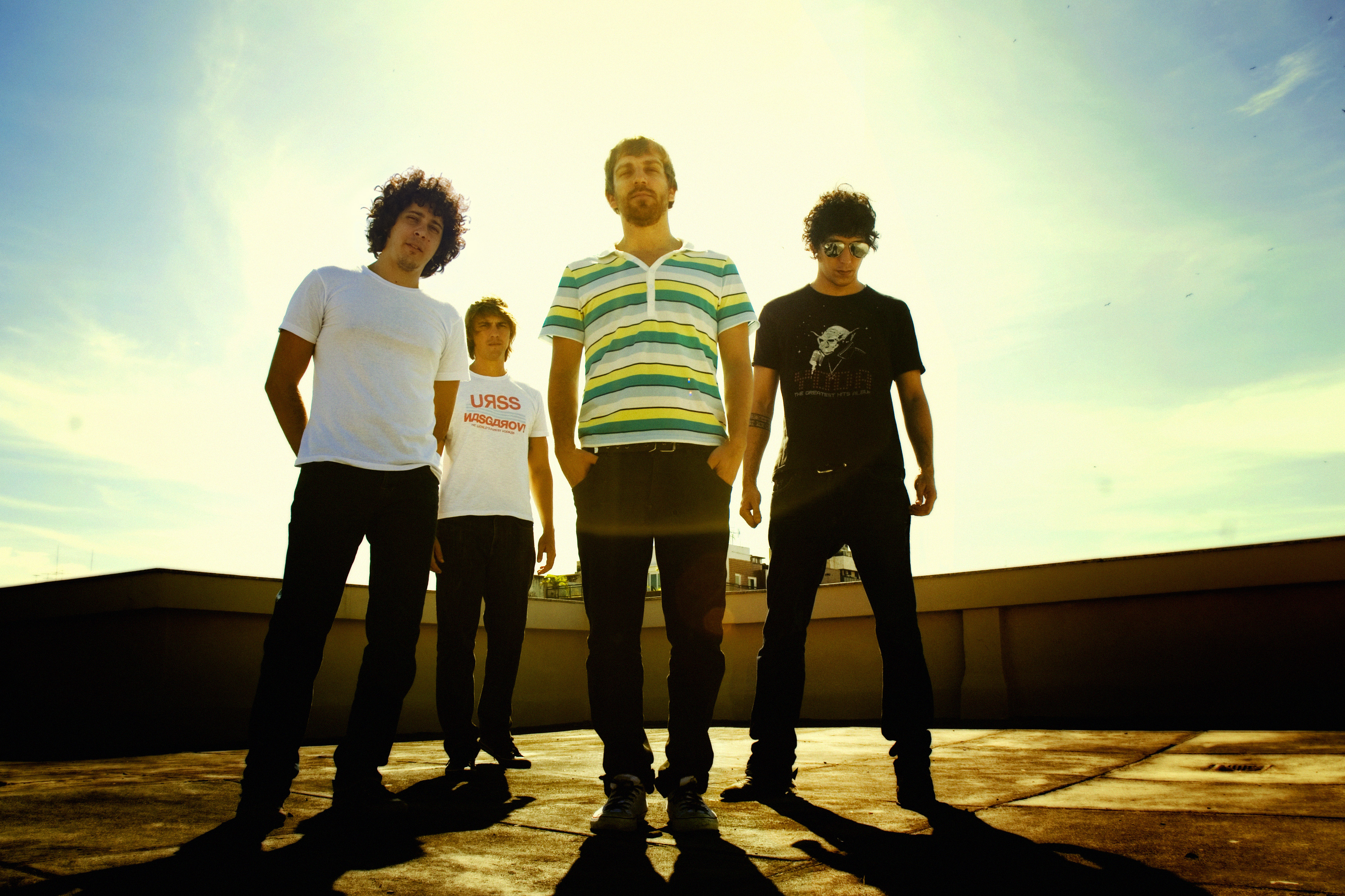 Foto de 2008 para divulgação.